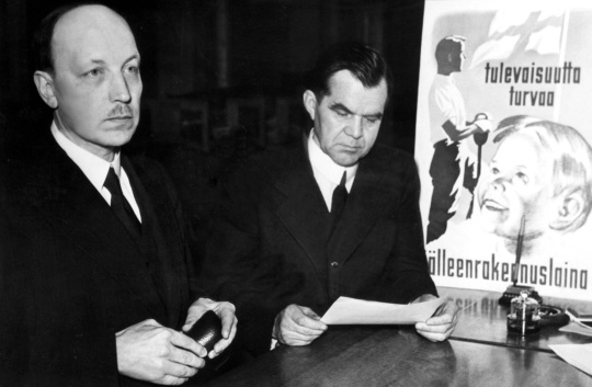 Presidentti Risto Ryti (vas.) ja ministeri J. W. Rangell ovat asettuneet jälleenrakennuslainasta kertovan julisteen äärelle.